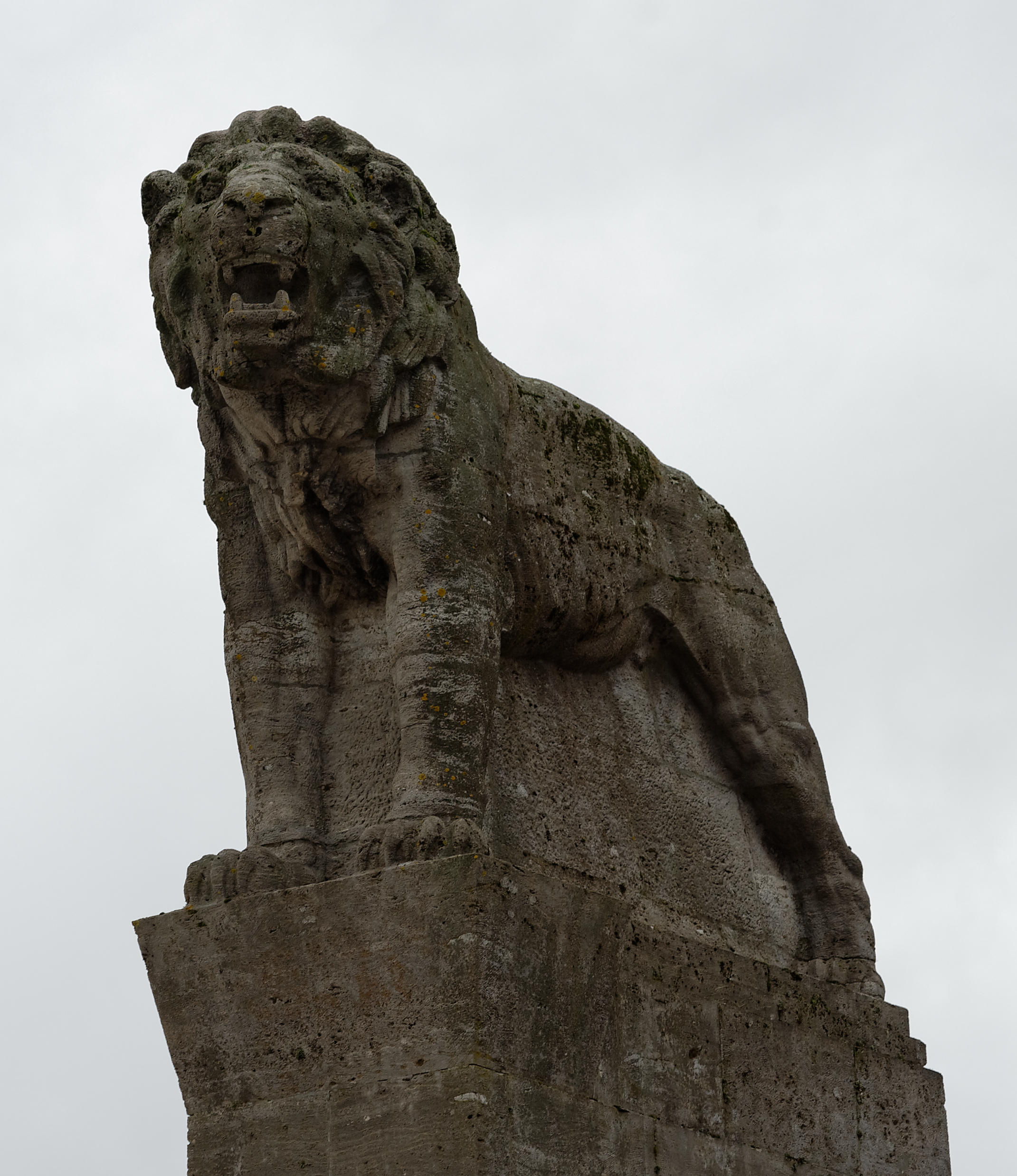 Bergischer Löwe auf dem Rathausplatz Remscheid